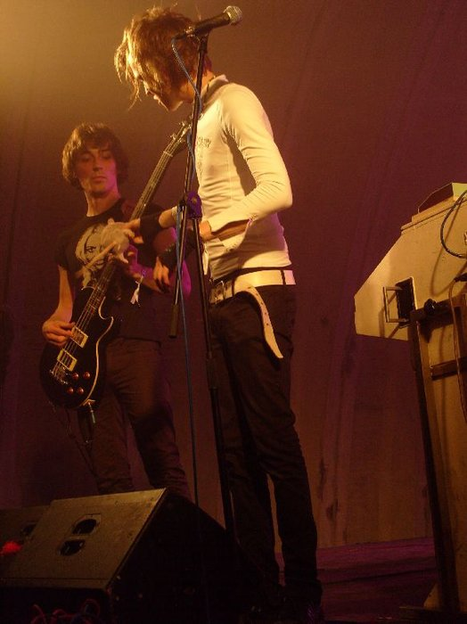 Sunflower Caravan na Rock for People 2008